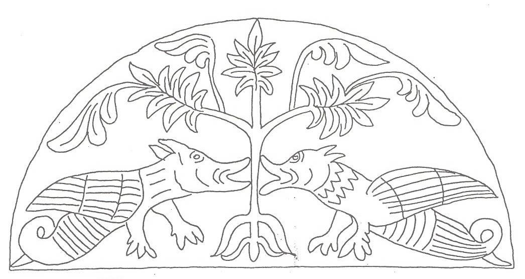 A soproni Szent Jakab kápolna sárkányos timpanonja